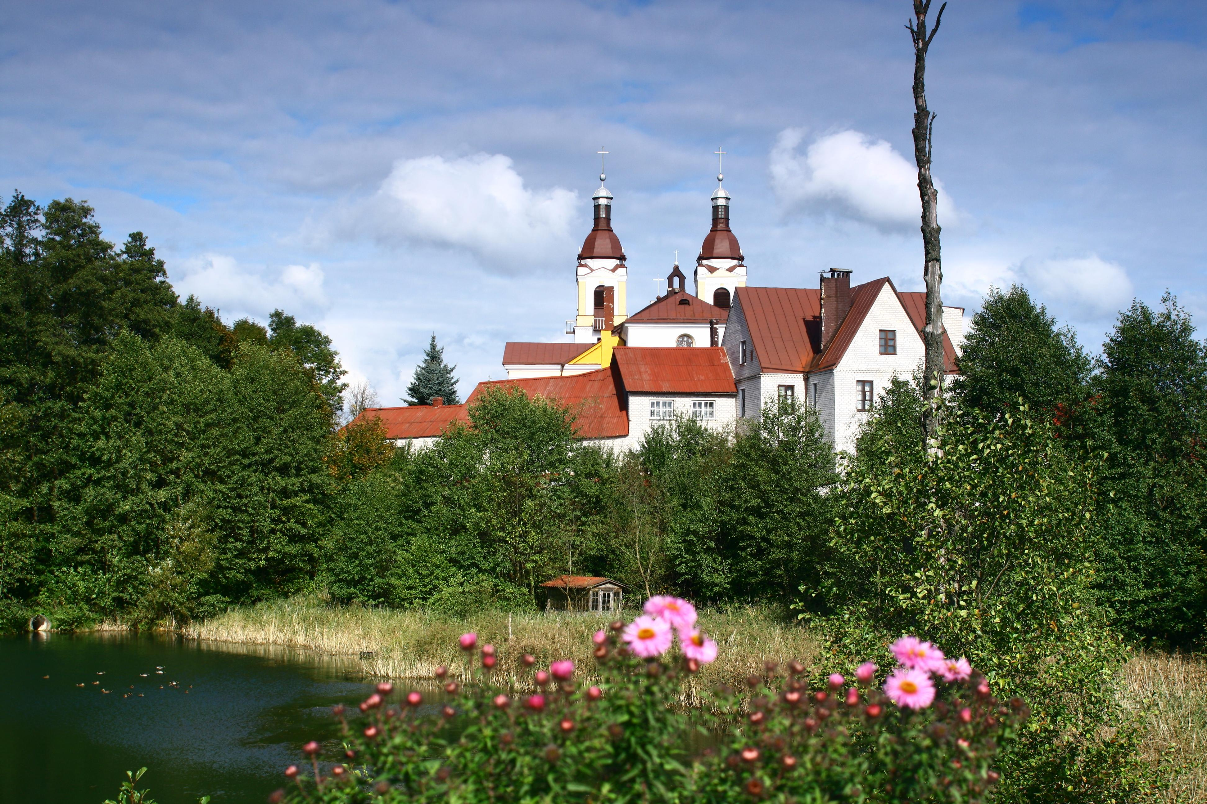 Sapockin, Belarus